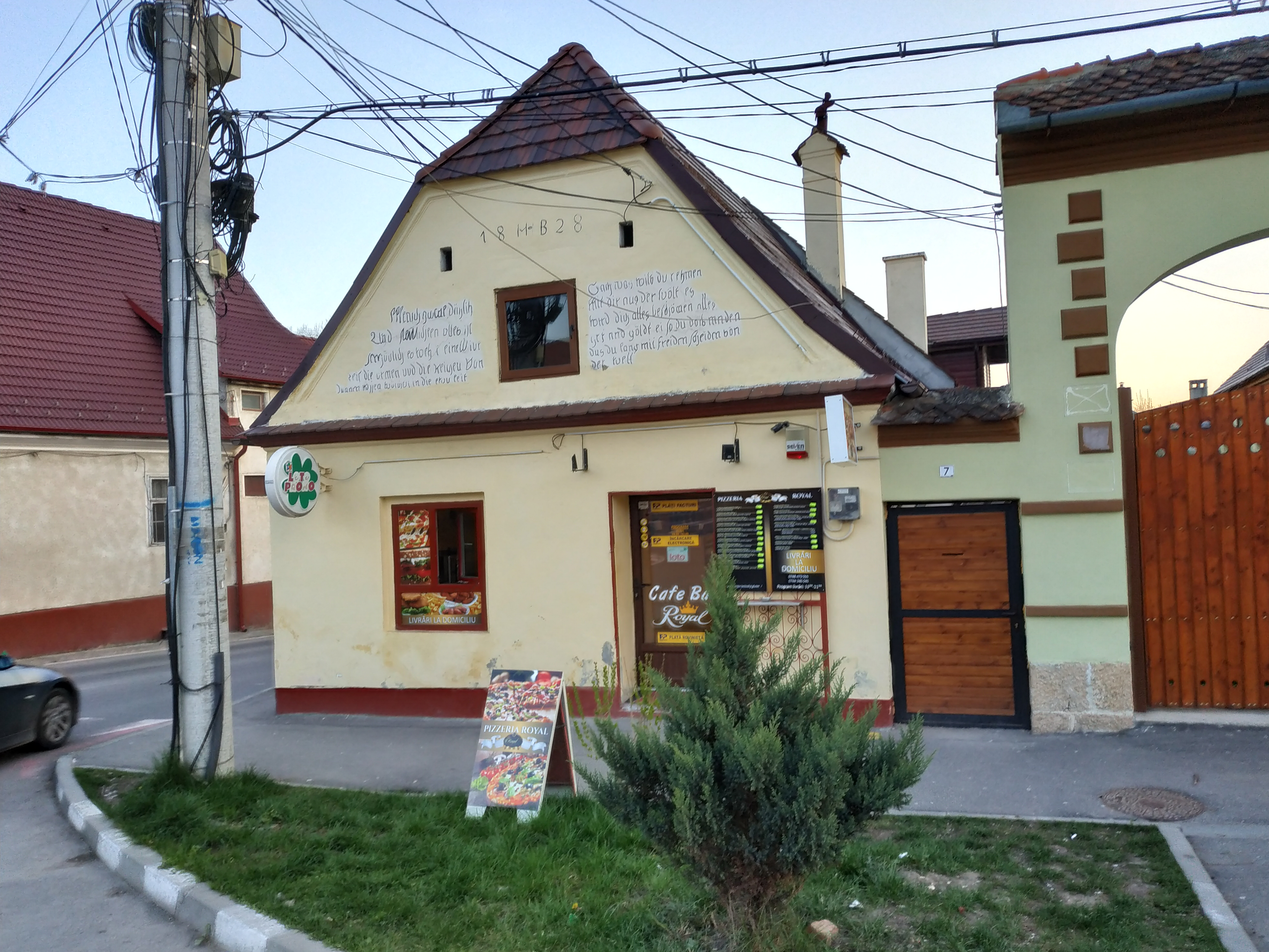 Casa de pe Str. Măgurii Nr. 7, Codlea, județul Brașov, România